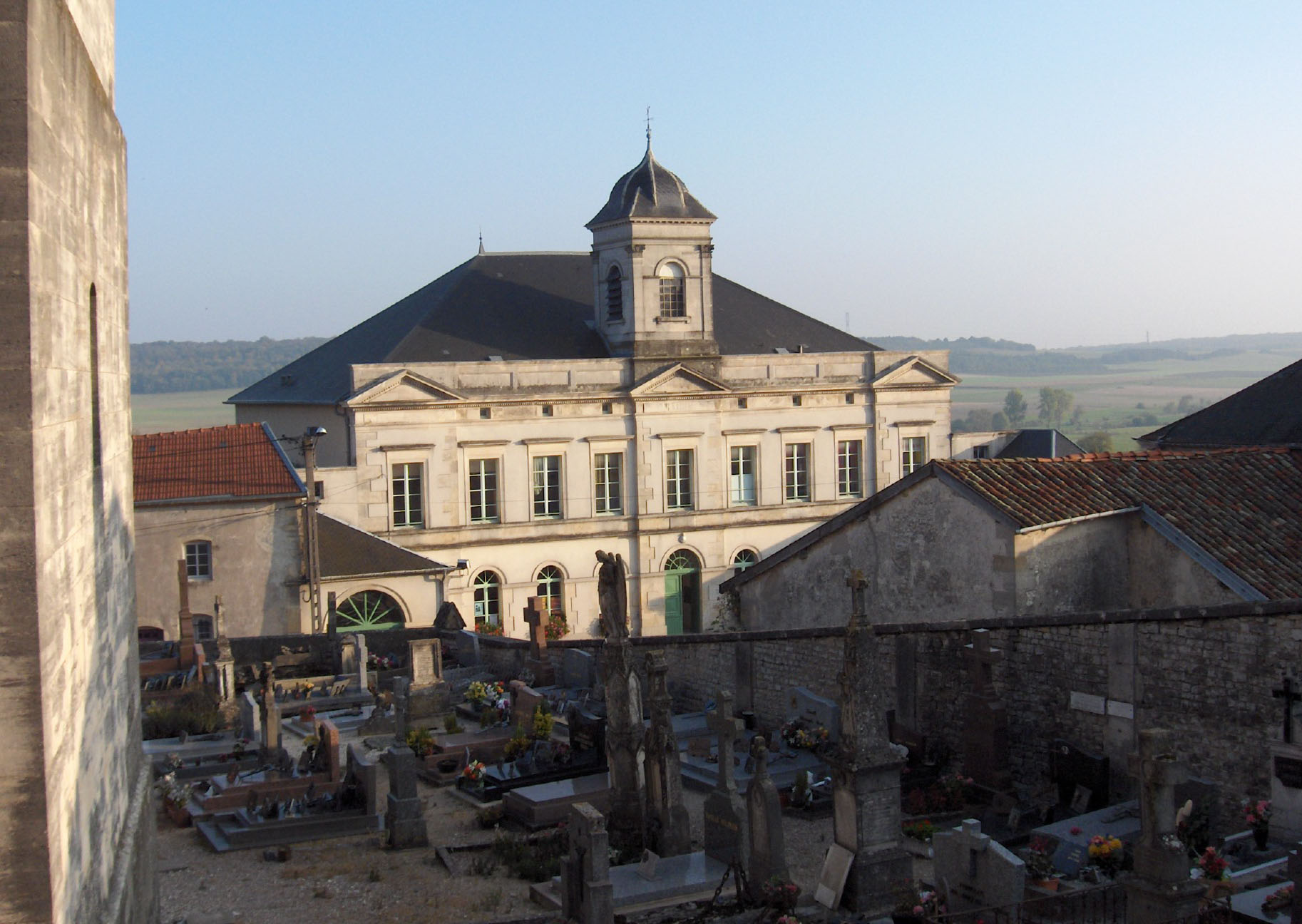 Le cimetière et l'hôtel de ville depuis l'église Saint-Florentin à Bonnet (Meuse, France)